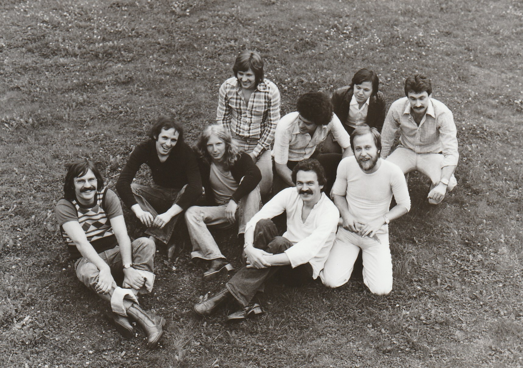 TIME IN SPACE 70er Jahre